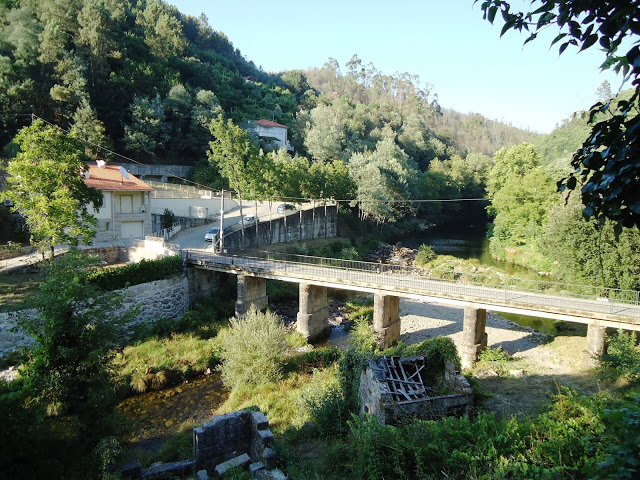 Amarante Rio Olo Ponte